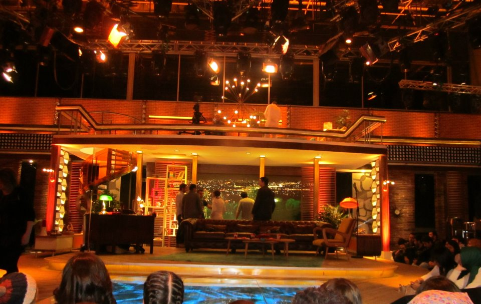 Beyaz Show stüdyosundan bir görünüm.